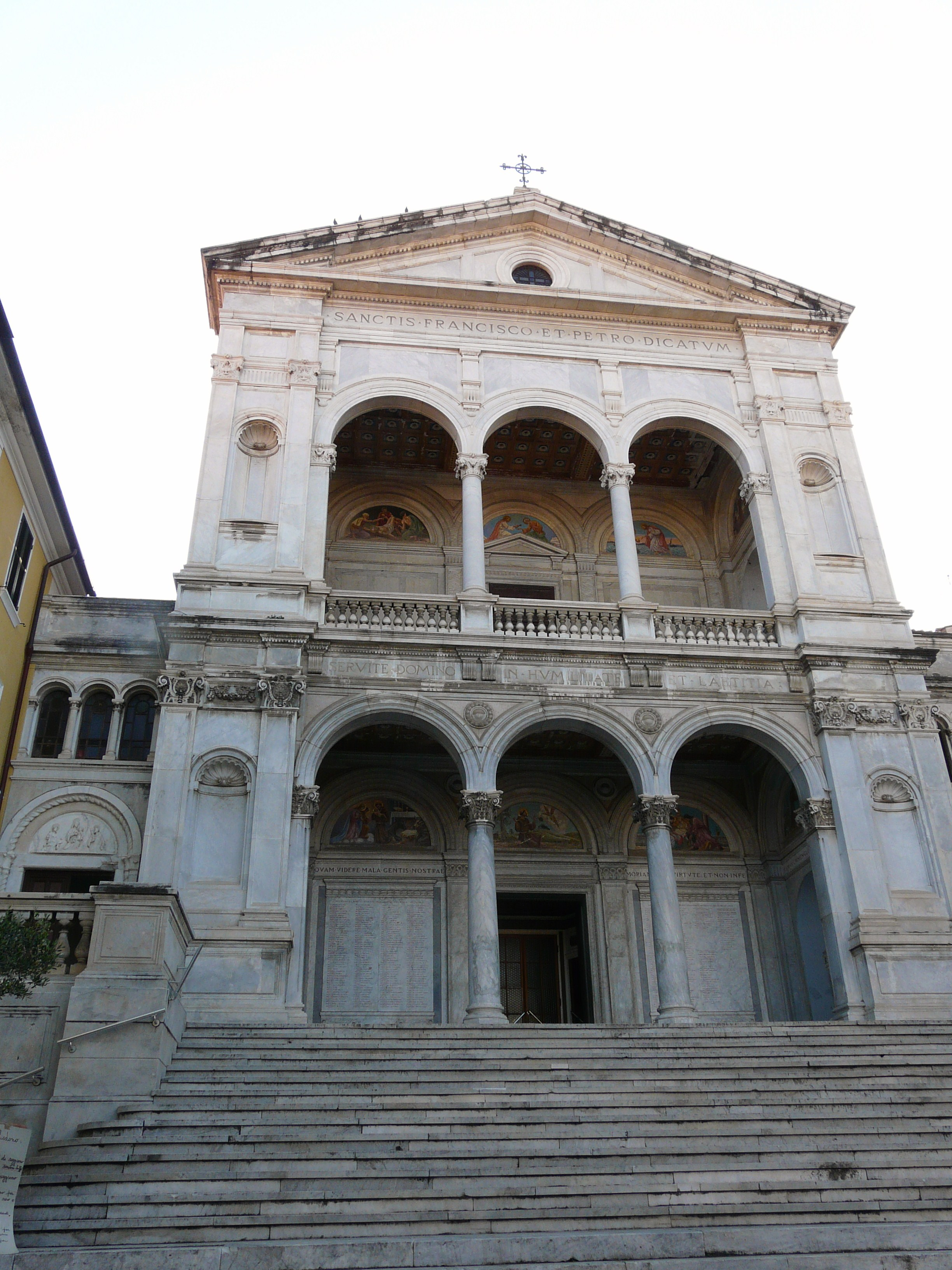 Facciata esterna del duomo di Massa, Toscana, Italia